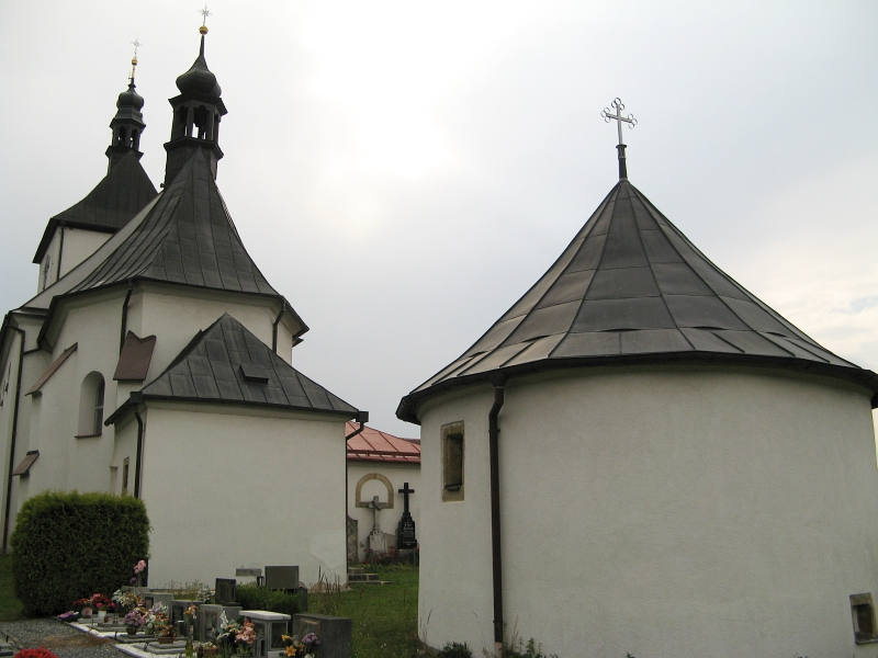 Kostel svatého Antonína, Opatov (okres Svitavy).